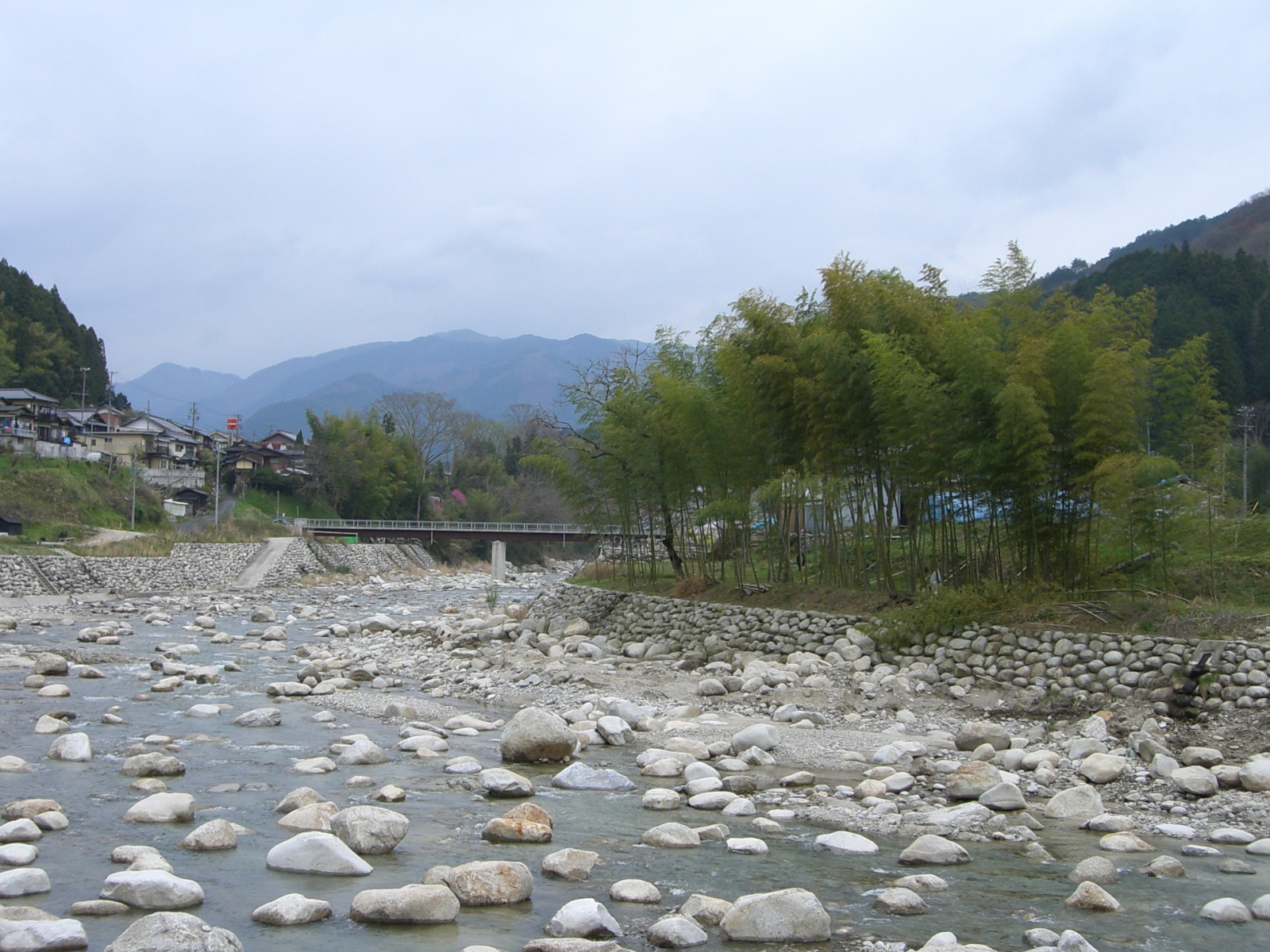 Kamimura River,Gifu,Japan